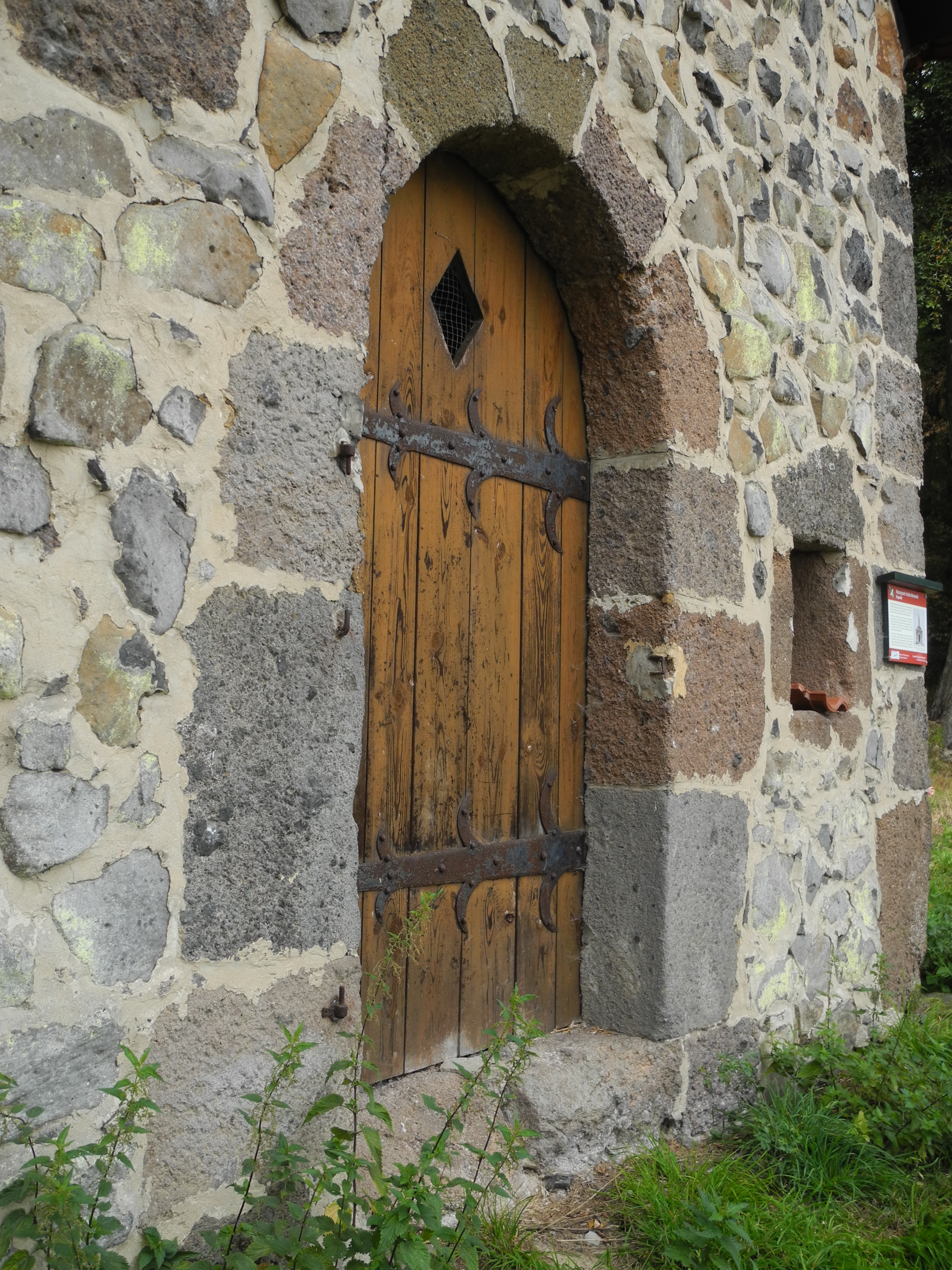 Die Kapelle am Waldrand im Schlosspark Riede, Hessen, Deutschland. Erbaut um 1799 nach Plänen von Heinrich Christoph Jussow - das Gebäude ist nicht mehr im Originalzustand.